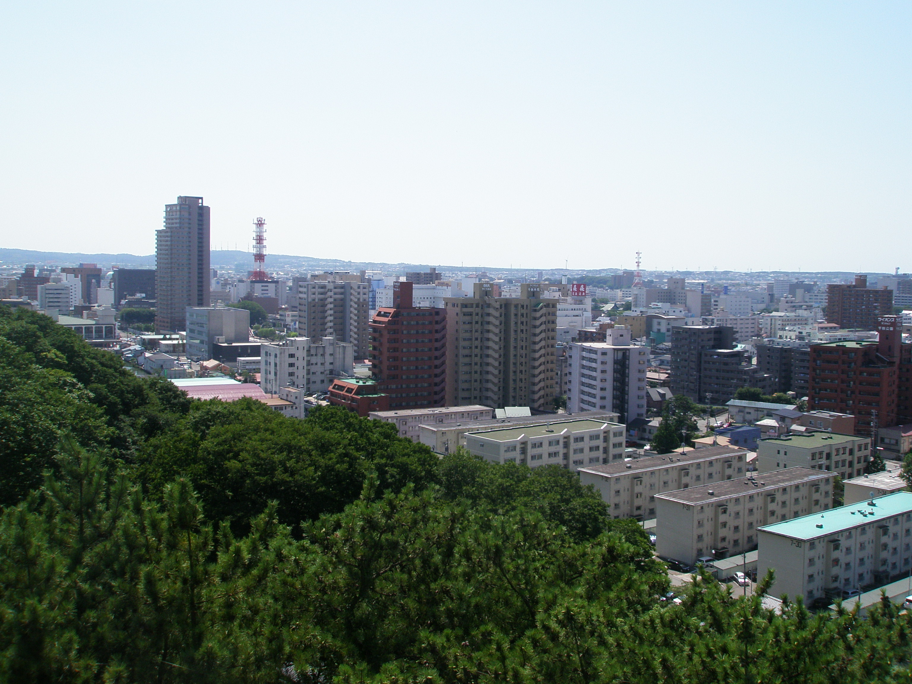 千秋公園内の久保田城から見た秋田市街